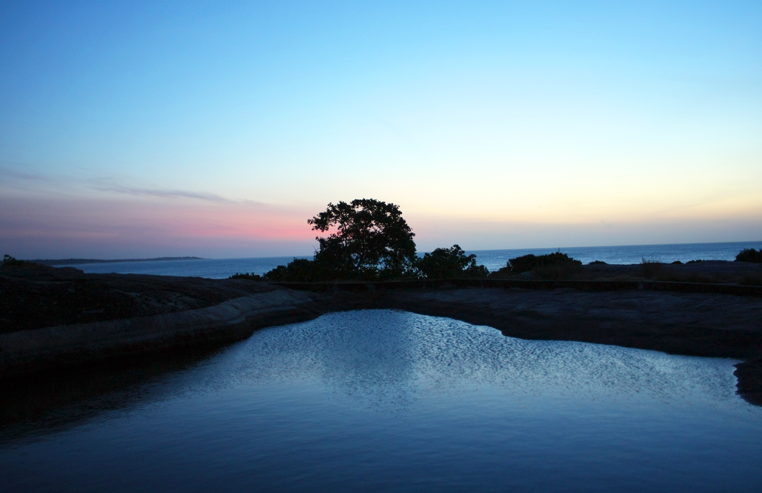 உகந்தை Uganthai Okanda.